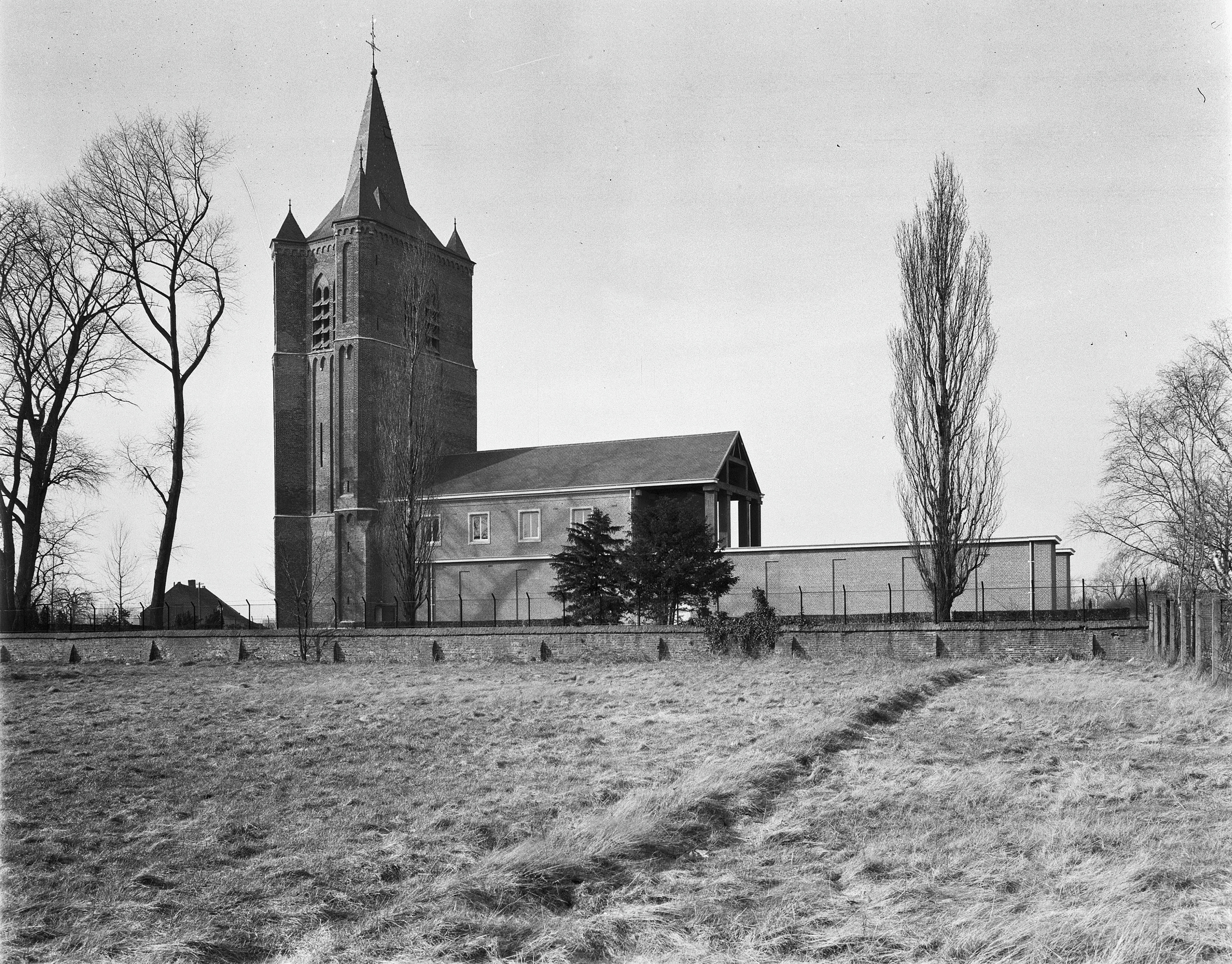 Nederlands Hervormde Kerk: kerk